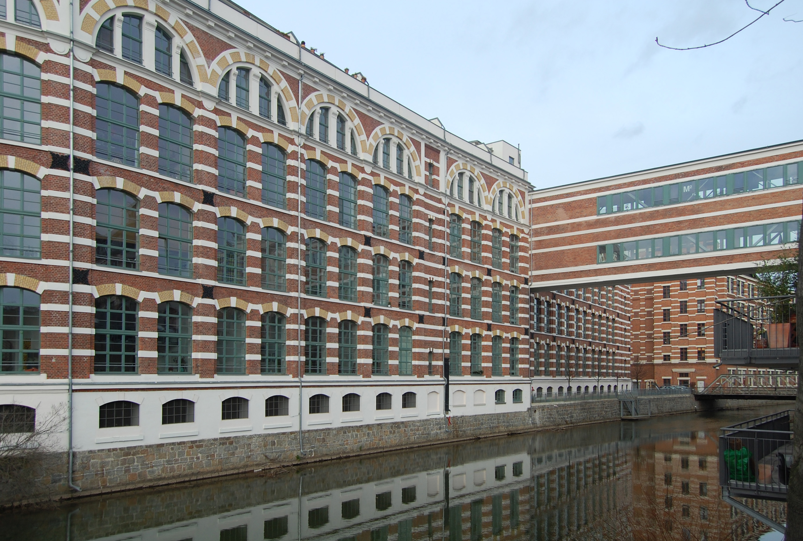 Leipzig, Gebäude der Elsterlofts